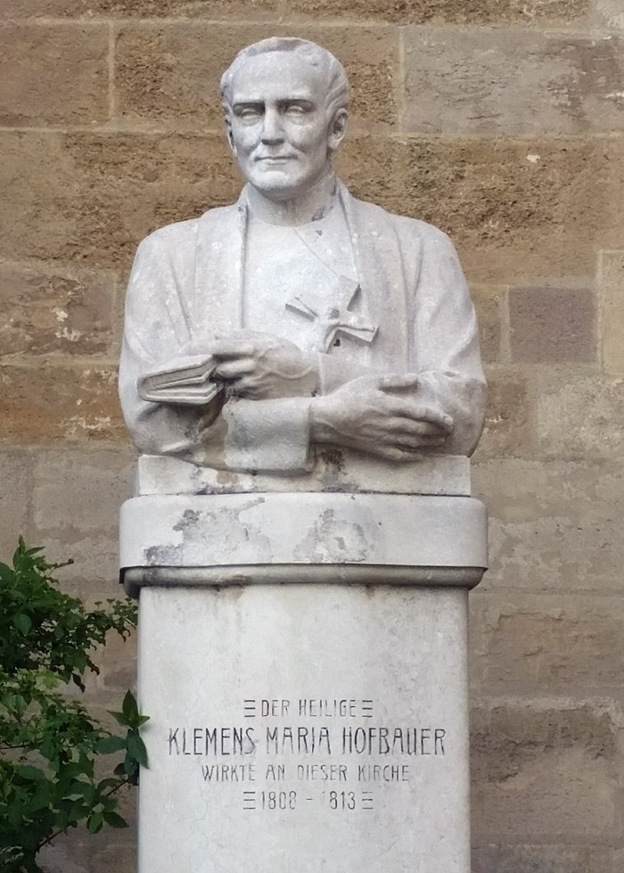 Klemens Maria Hofbauer, Büste am Minoritenplatz in Wien